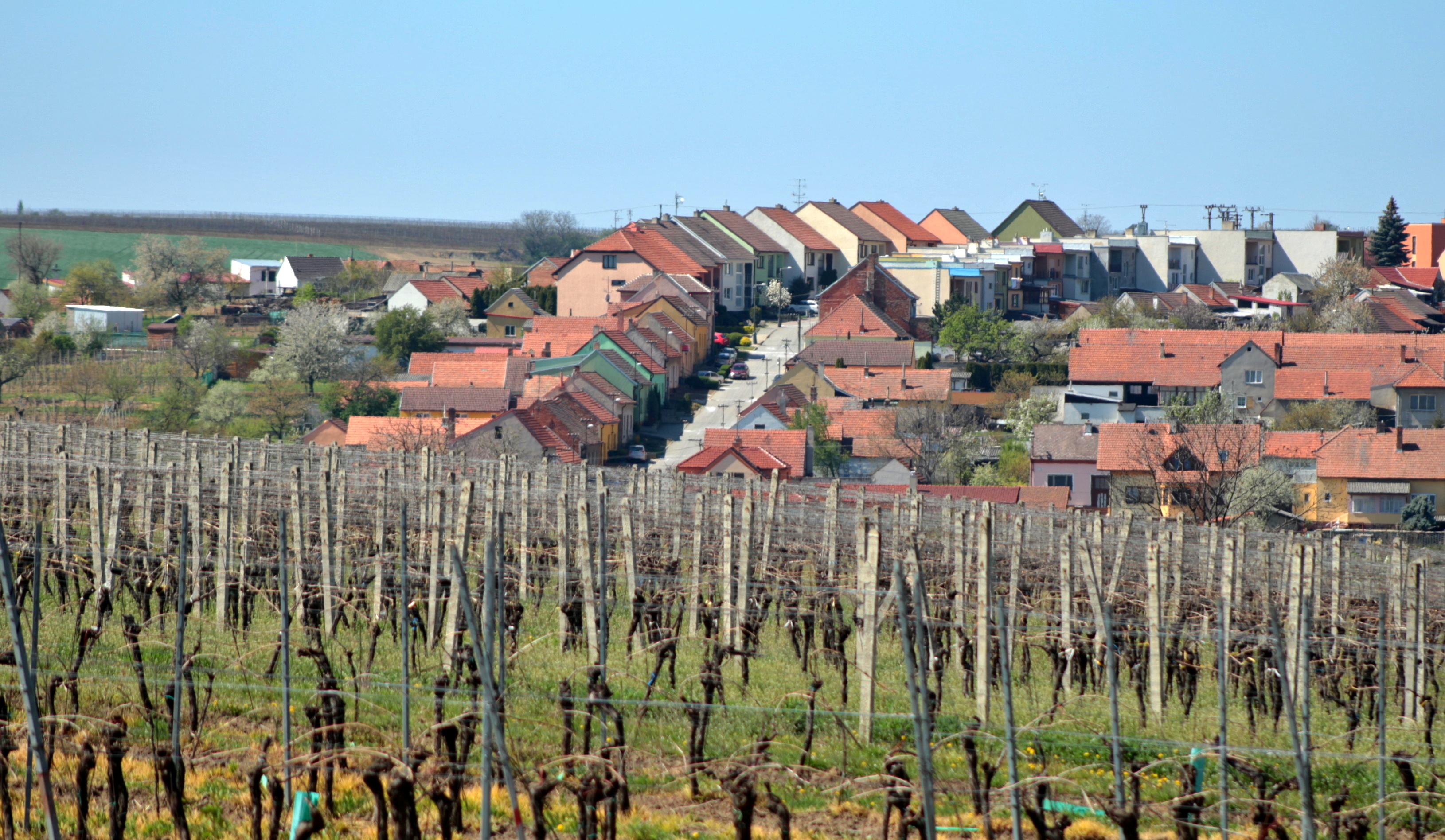 Čejkovice a vinice